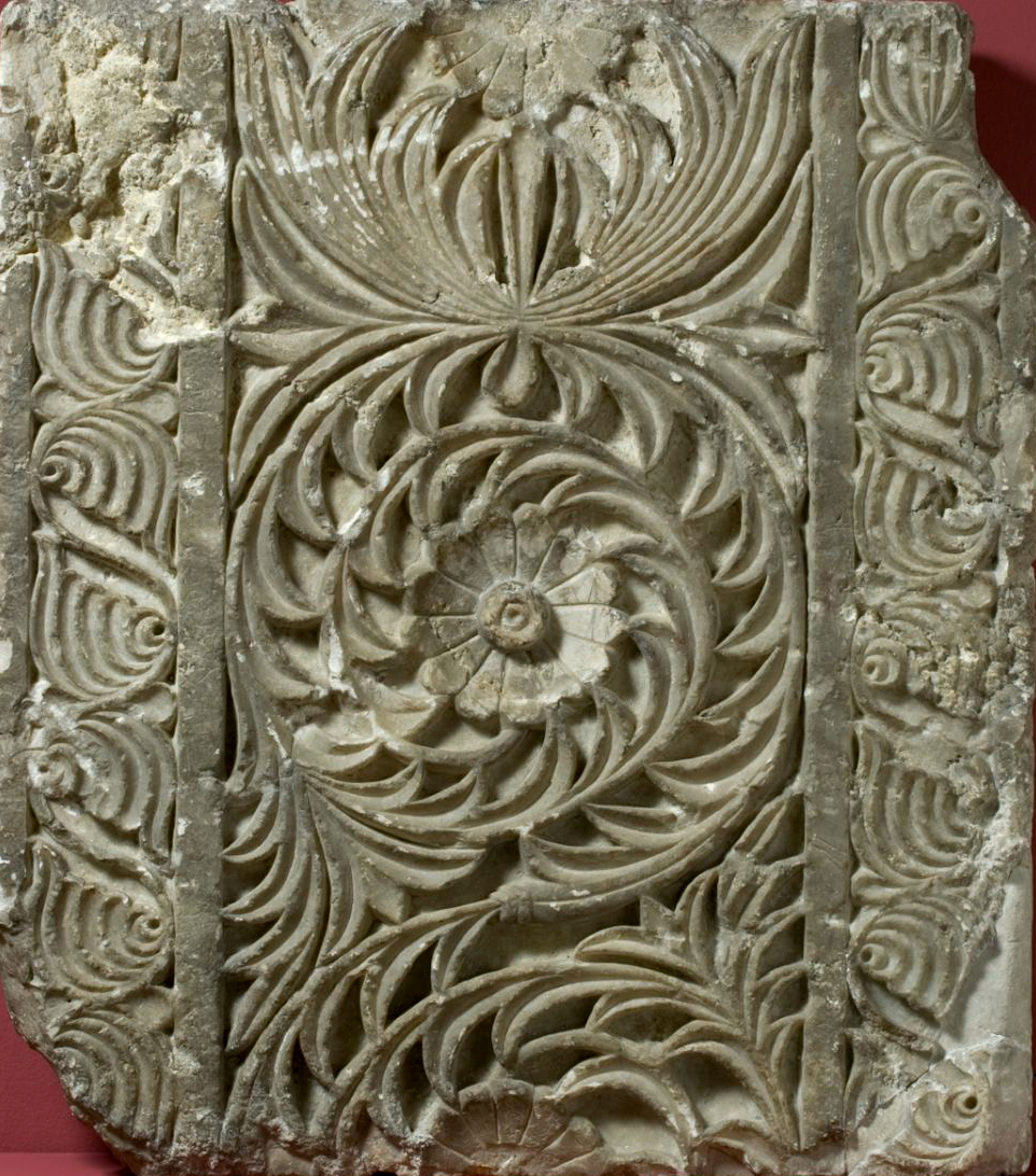 Cancel mozárabe de Zaragoza. Encontrado en excavaciones arqueológicas de la plaza del Pilar de Zaragoza. Siglo X. Alabastro. Museo de Zaragoza. Inv. 7660